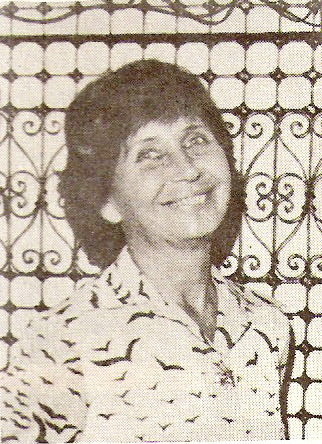 maria esther de miguel, escritora argentina